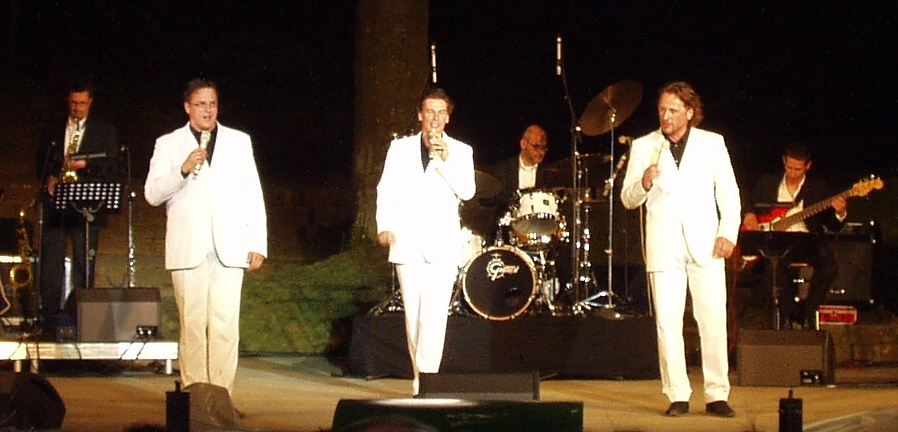 Die Jungen Tenöre beim Konzert "Best of" im Bergwalttheater weißenburg